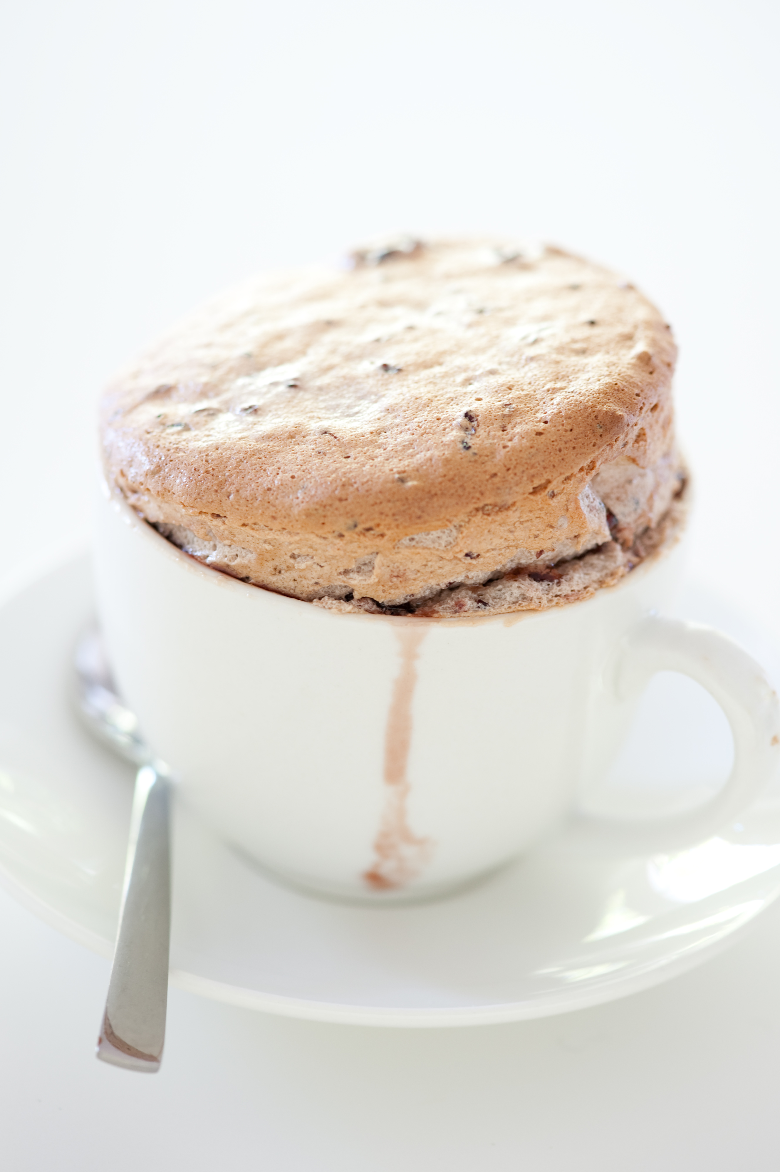 Berry soufflé.